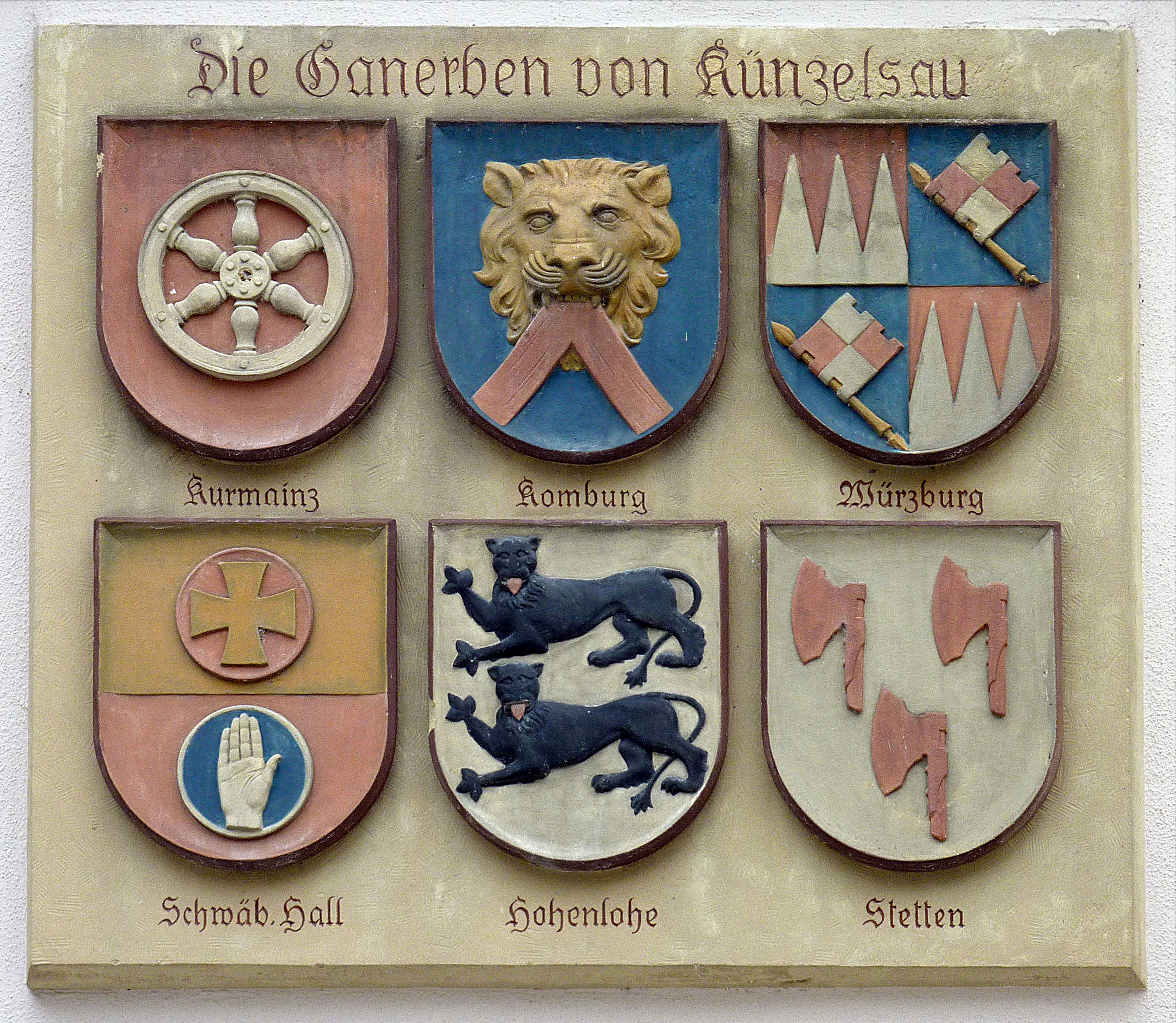 Ganerben Künzelsaus, Schmuck am Alten Rathaus